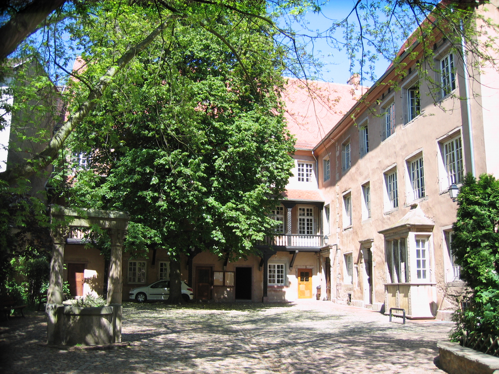 Conservatoire à Rayonnement Départemental (CRD) de Musique et d'Art dramatique